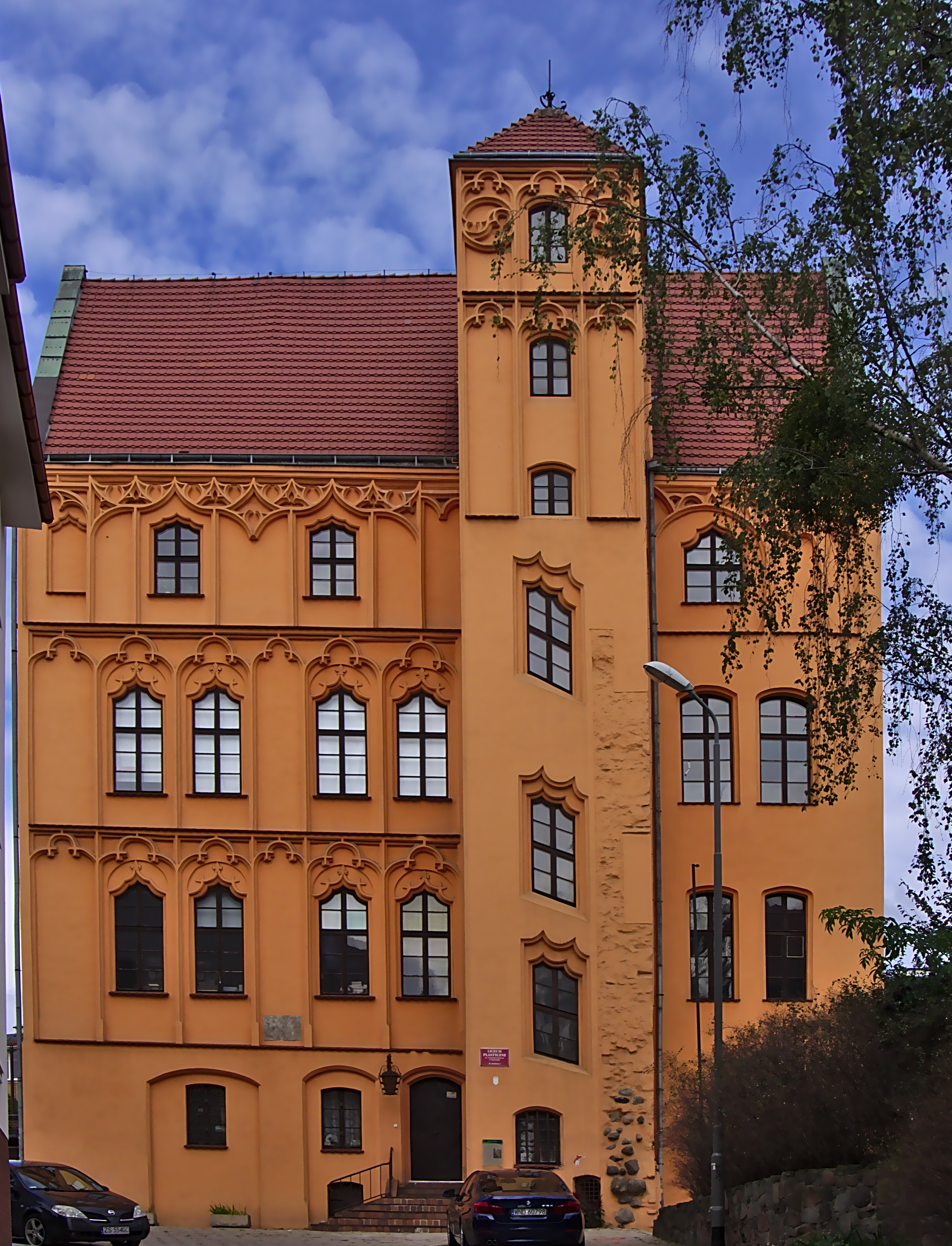 Szczecin, Kamienica Loitzów, ob. Liceum Sztuk Plastycznych Wikidata has entry Q33305440 with data related to this item.